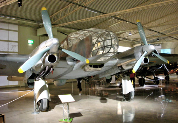 Caproni Ca.313 Bilden visar den replika i full skala som byggdes i samband med inspelningen av Lars Molins TV-serie Tre kärlekar (1989) utställd på Flygvapenmuseum i Linköping.